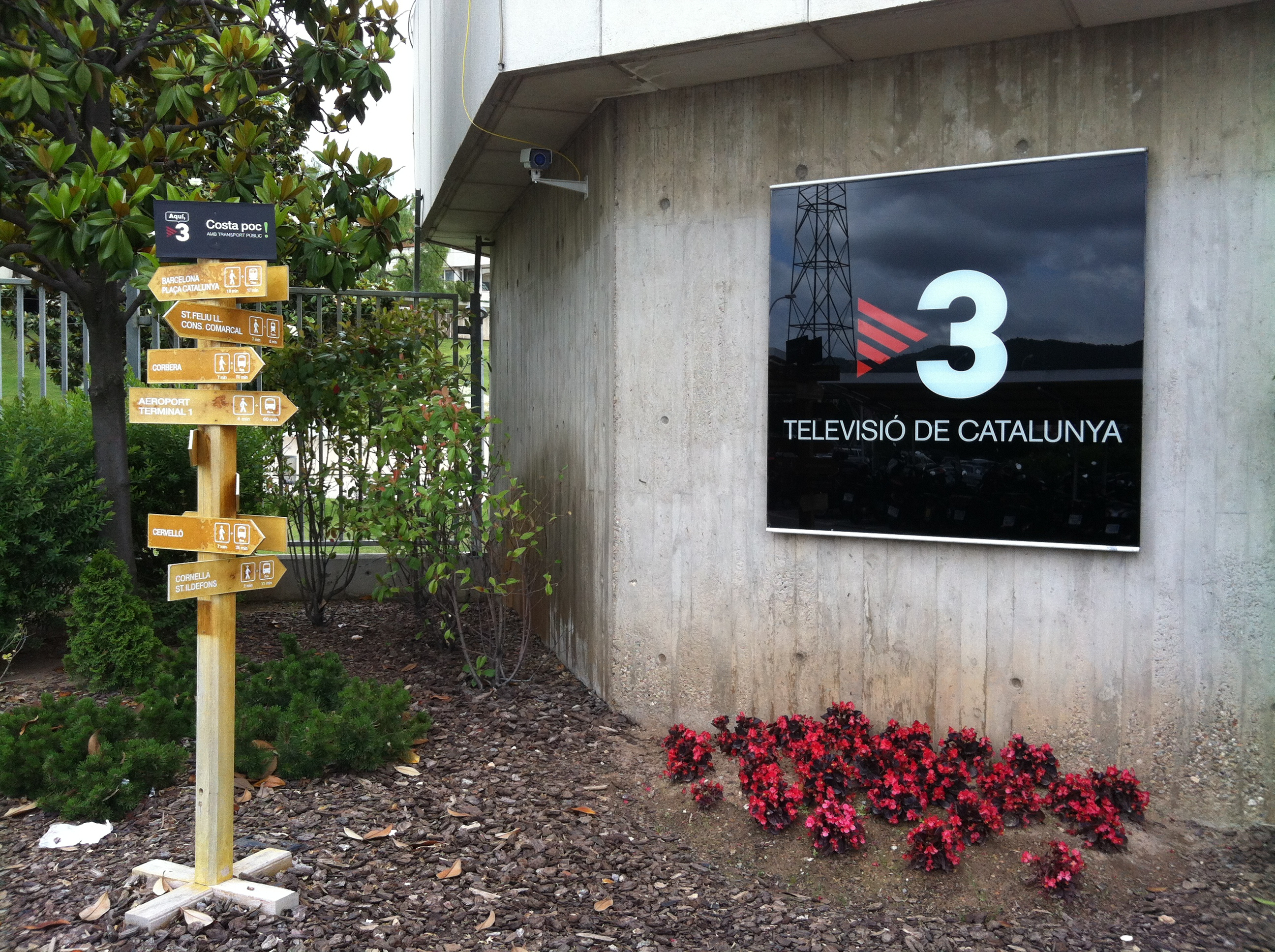 Televisió de Catalunya Entrada a TV3